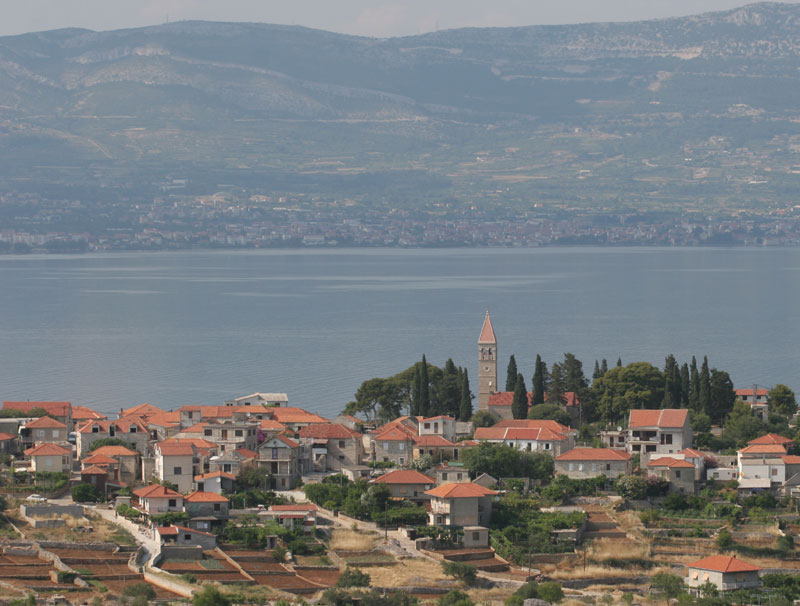 Slatine na Čiovu.